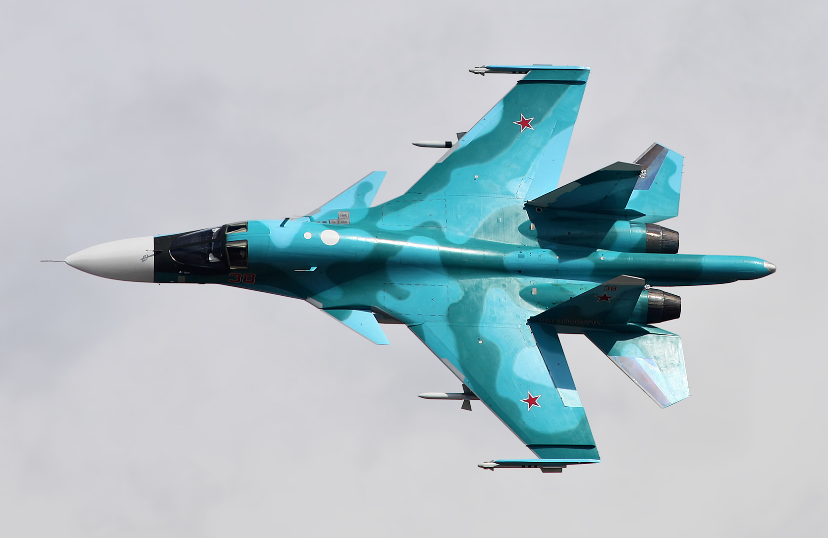 Су-34 (Su-34)